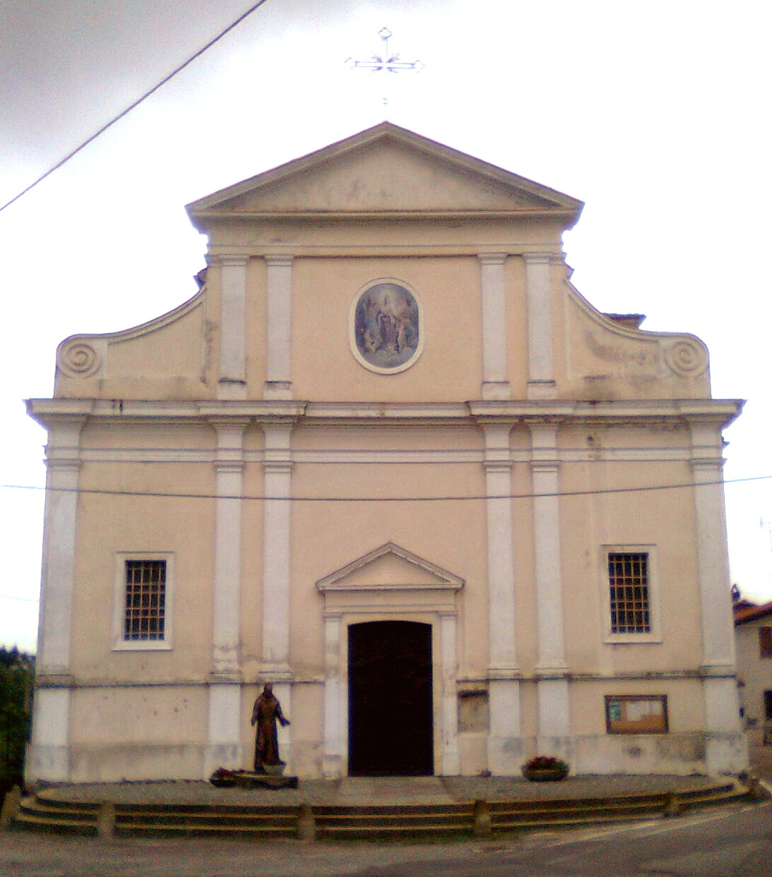 Chiesa di Santa Maria Assunta costruita in stile tardo barocco,con statua di San Pio sul sagrato e presente nella piazza di Viverone paese.